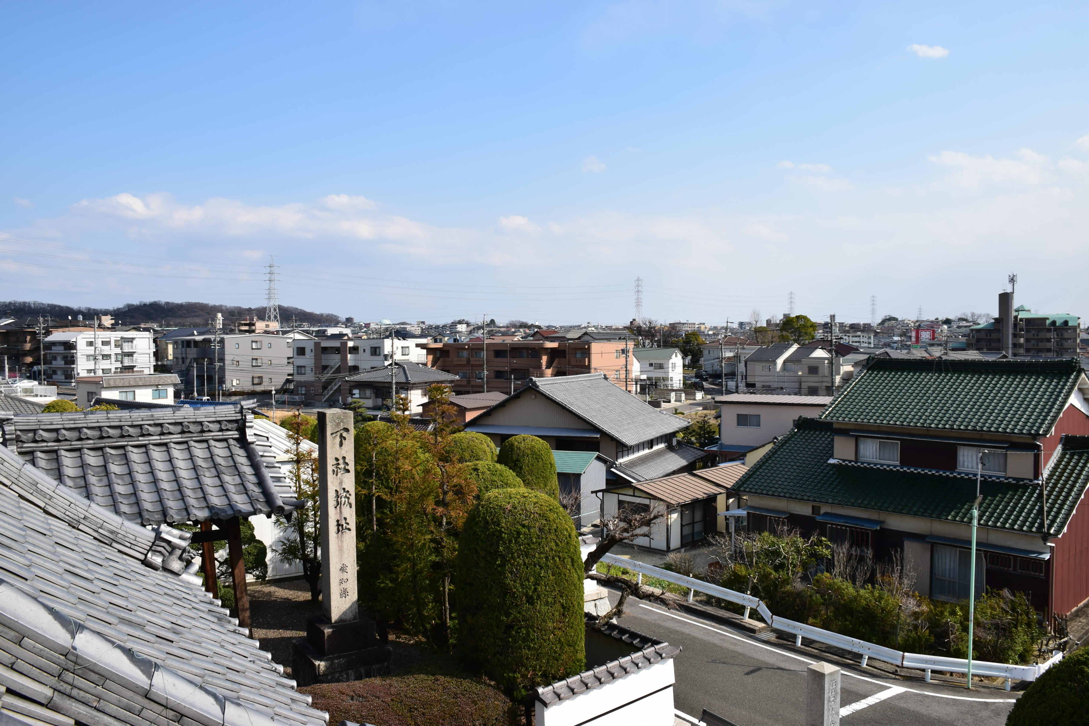 妙徳寺からの眺望